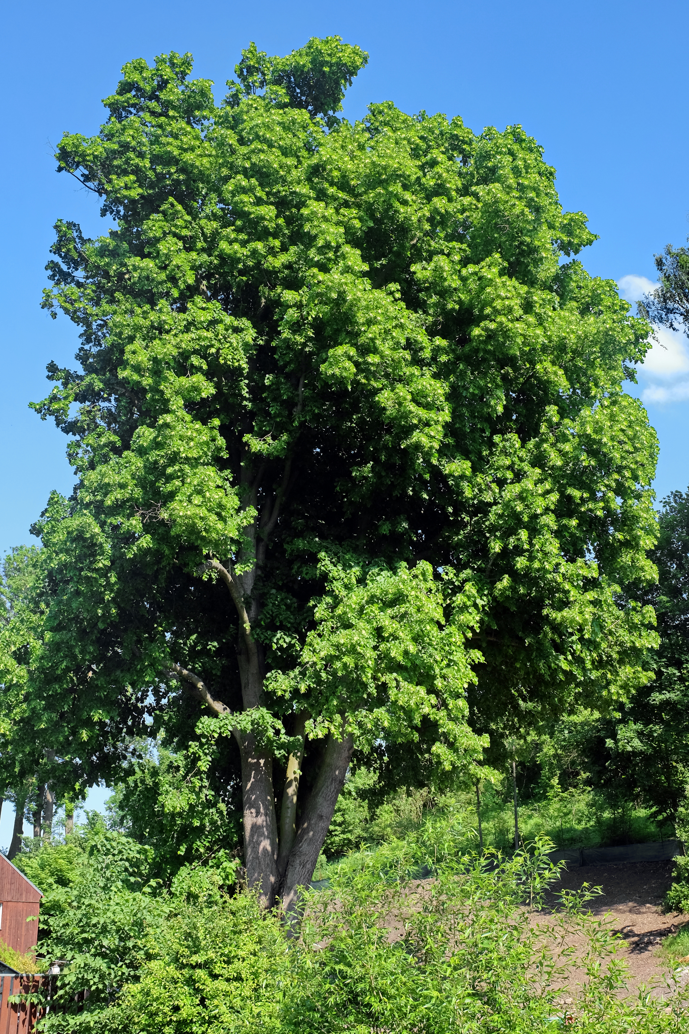 Památný strom - Květnovská lípa - Květnová, okres Karlovy Vary